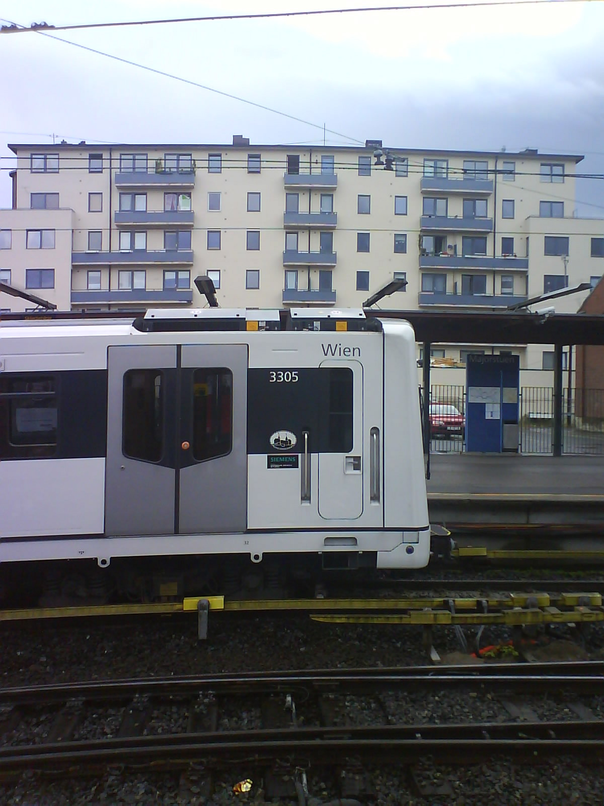 Majorstuen T-banestasjon med MX3000-togsettet «Wien»